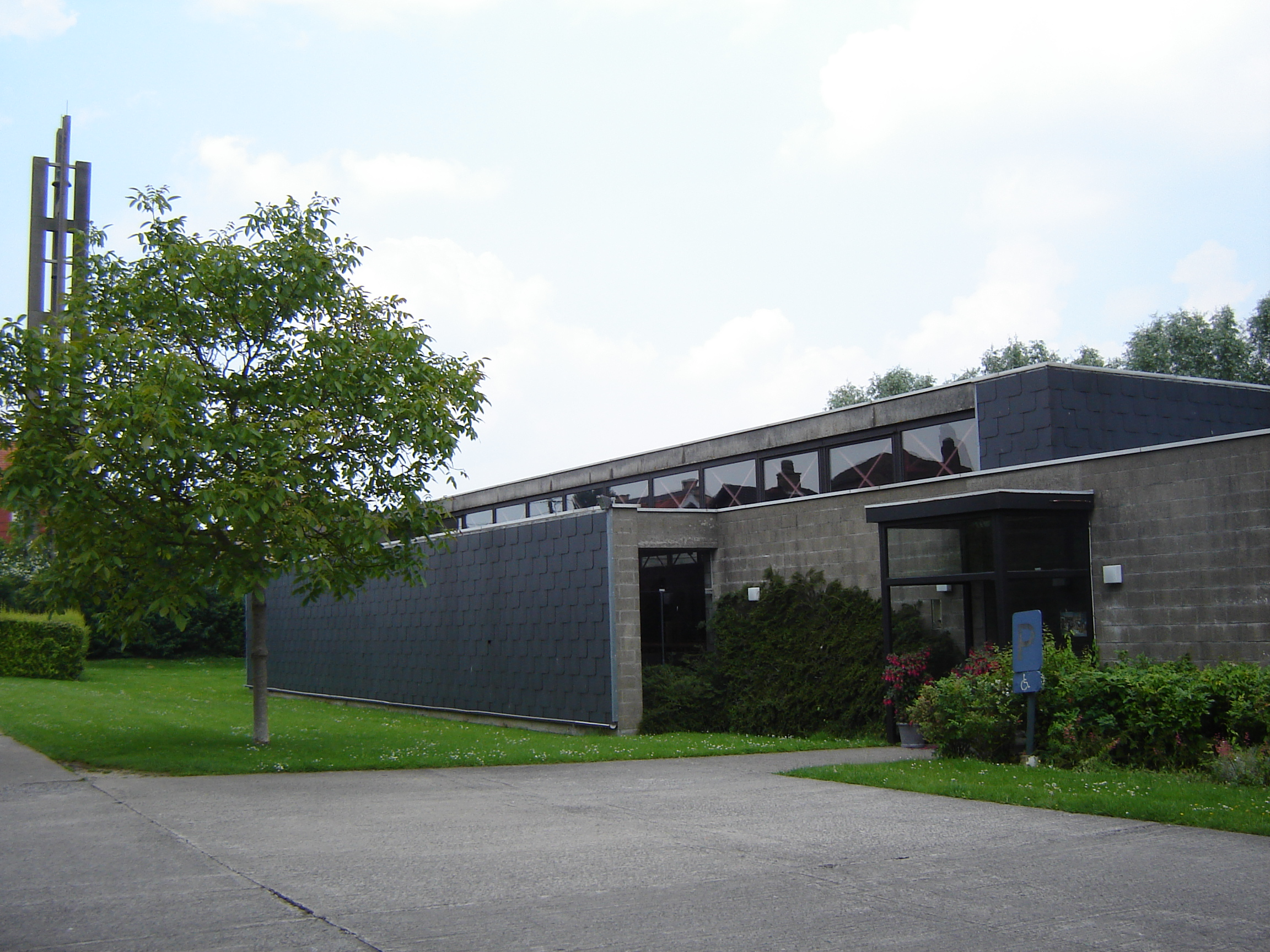 Kerk van de Heilige Maagd der Armen, in Paradijs, RekkemChurch of the Blessed Virgin of the Poor in Paradijs, Rekkem. Paradijs, Rekkem, Menen, West Flanders, Belgium